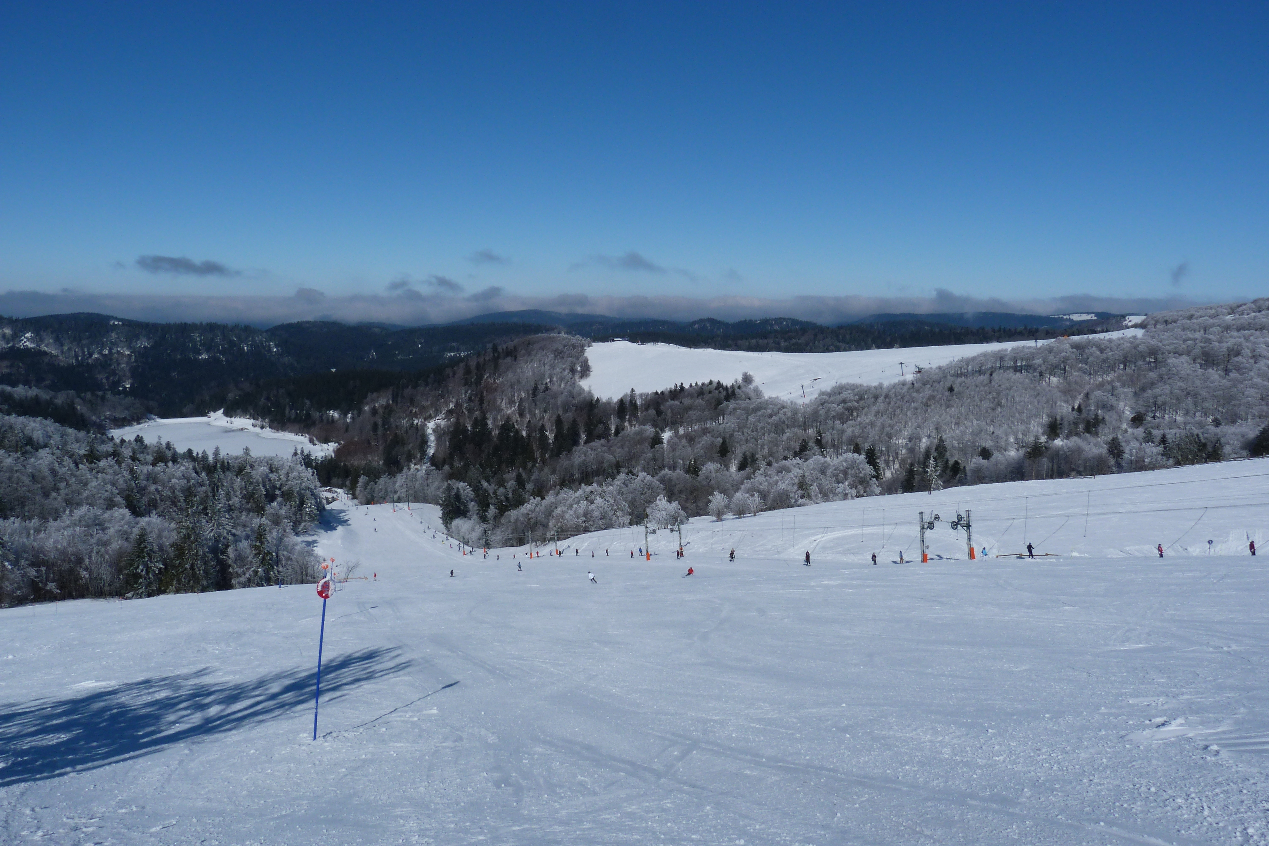 Piste de ski du Kastelberg dans la station La Bresse-Hohneck (Vosges).